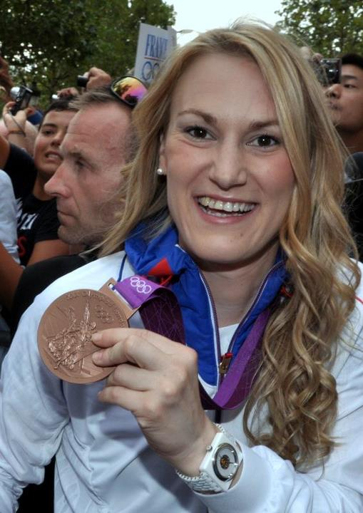 Marlène Harnois au défilé des médaillés français des J0 2012